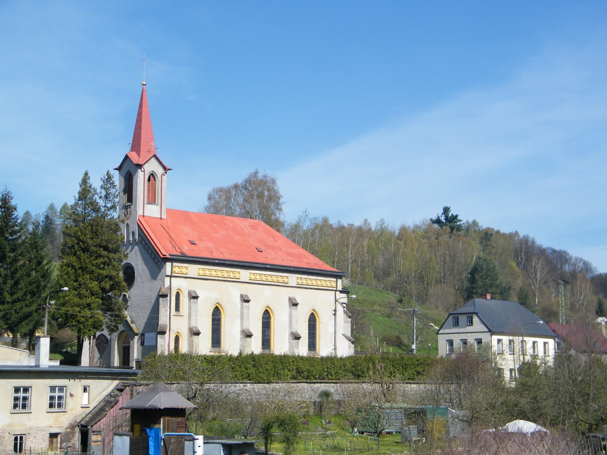 Kostel svatého Michaela archanděla v Dolní Poustevně